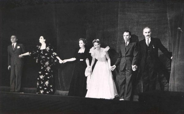 Németh László: Villámfénynél. Nemzeti Színház., Bemutató: 1938.03.30. Rendező: Németh Antal. Szereplők: Árpád: Apáthi Imre, Margit: Szabó Margit, Anna: Rápolthy Anna, Sata: Szeleczky Zita, Nagy Imre, körorvos: Timár József; Bakos Béla, főjegyző: Táray Ferenc. A kép hátoldalán [Apáthi Imrének] Szeleczky Zitától: 'Villámfénynél Siminek szeretettel Bpest, 941. febr 7. Sz. Zita'